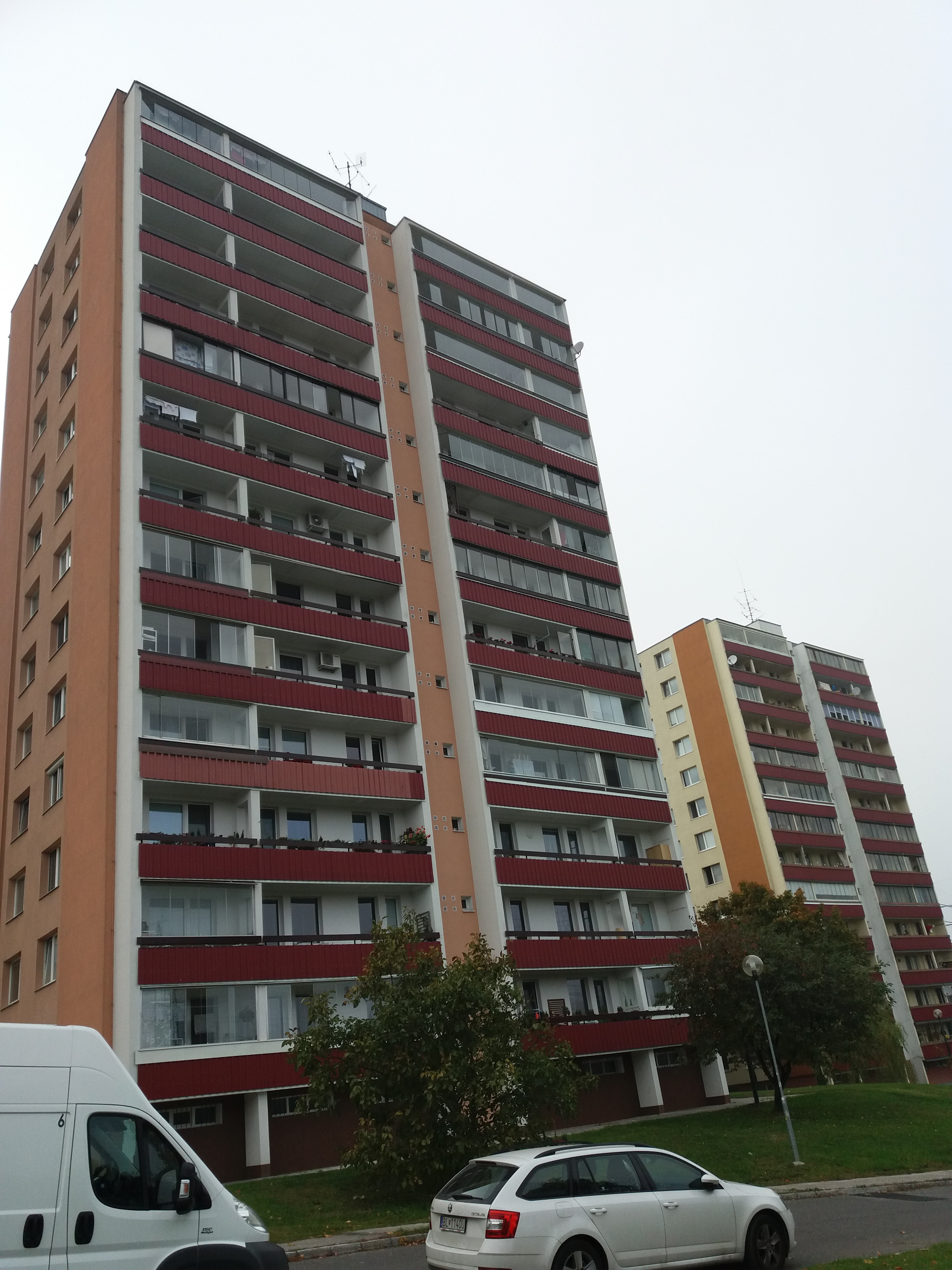 U